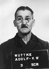 Adolf Karl Wilhelm Wuttke (* 25. Januar 1890), Kommandant des KZ-Außenlagers Schönebeck (Außenstelle des KZ Buchenwald). Verurteilt 1947.